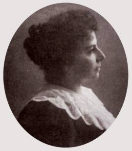 Foto di Vittoria Aganoor (1855-1910)